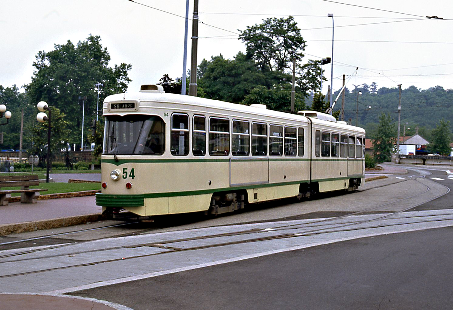 Enkelegelede PCC in Saint-Etienne